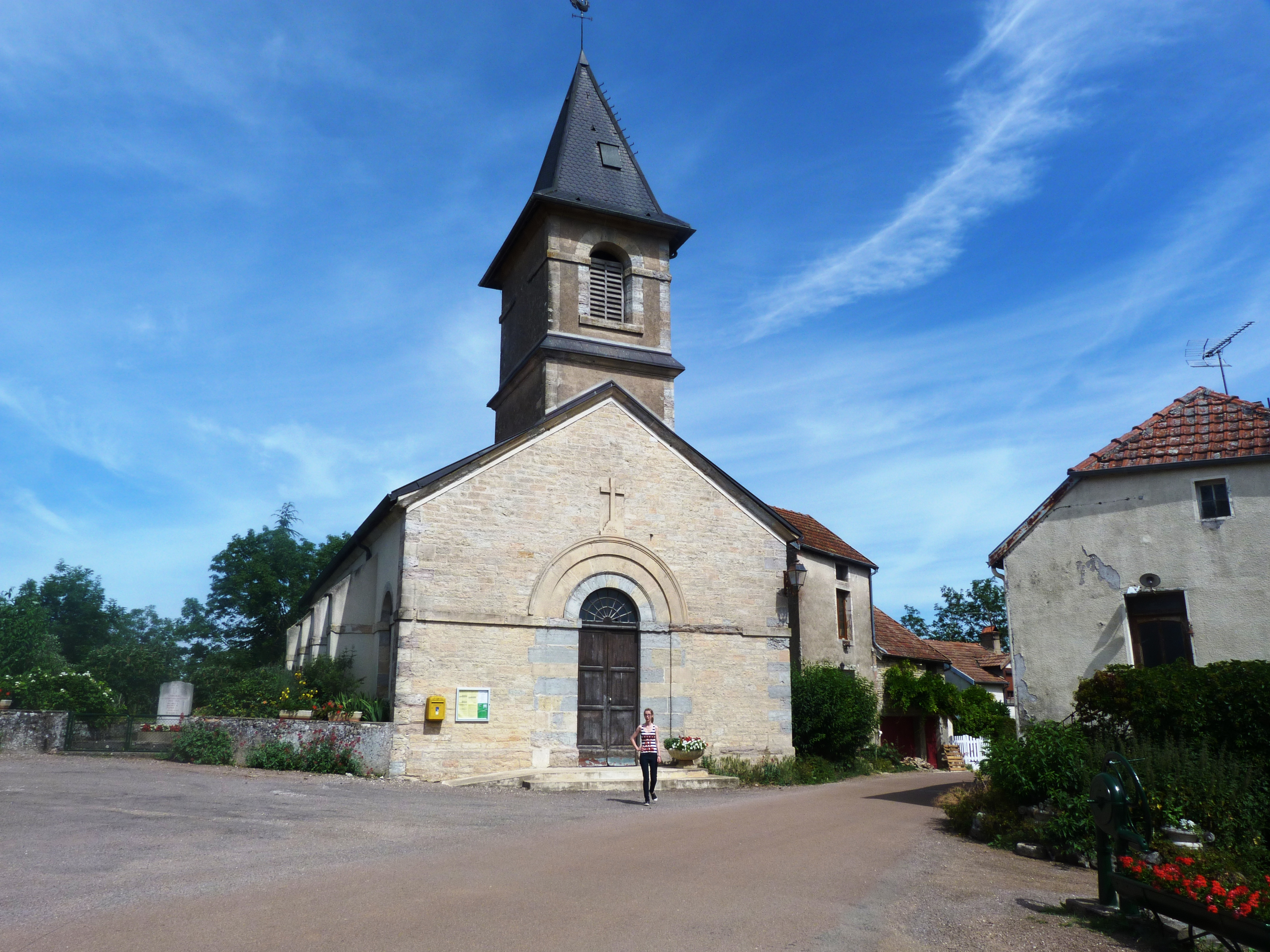 Preĝejo de Gergueil.